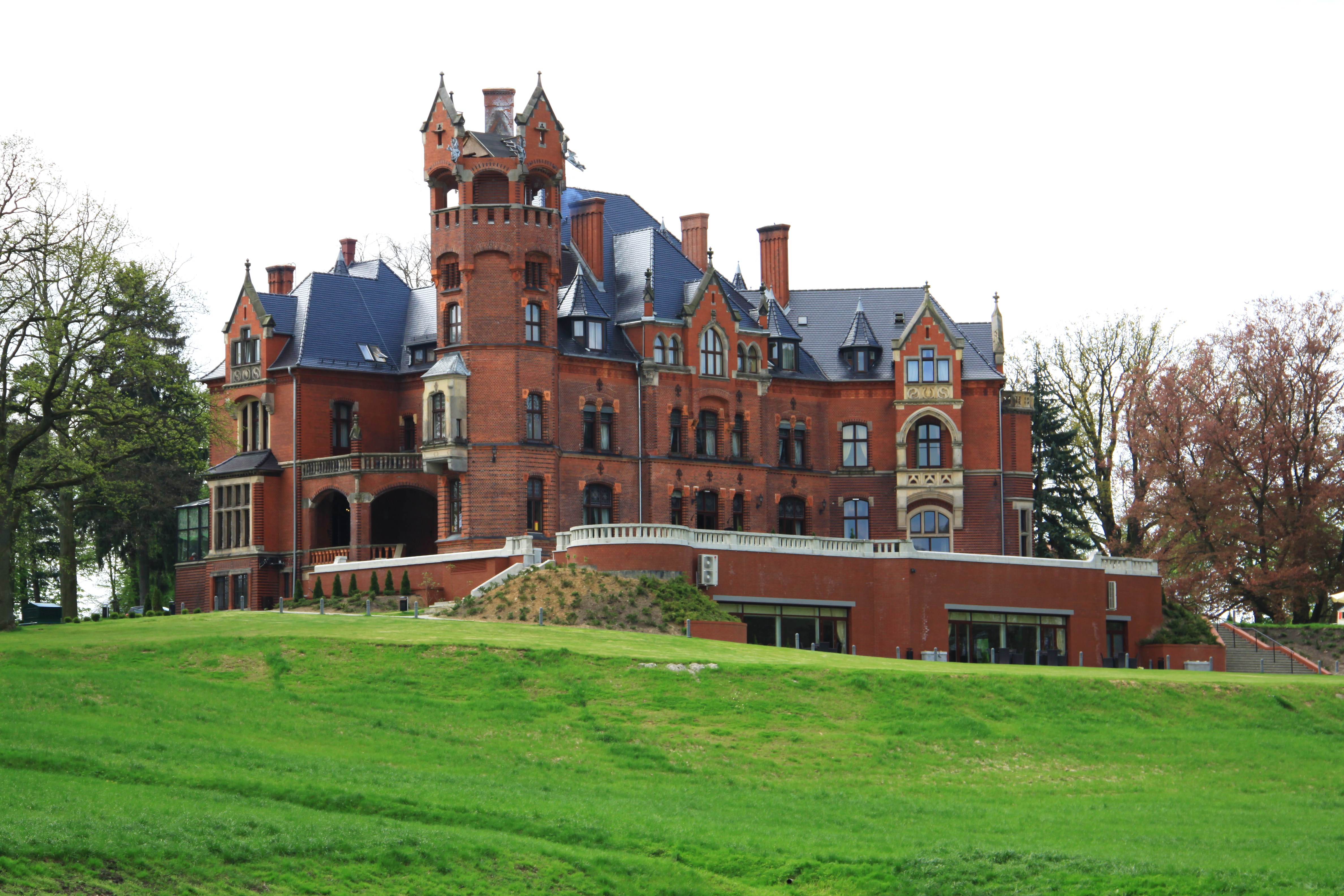 Wąsowo, pałac, tzw. zamek, 1870-72, pocz. XX